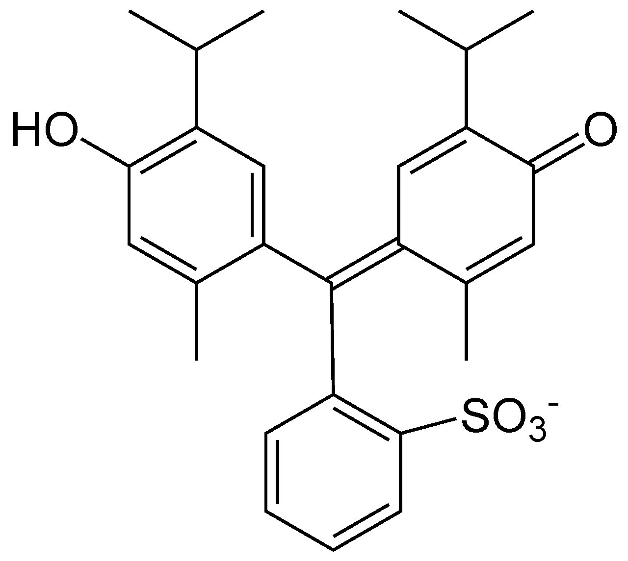 Thymolblau bei neutralem pH